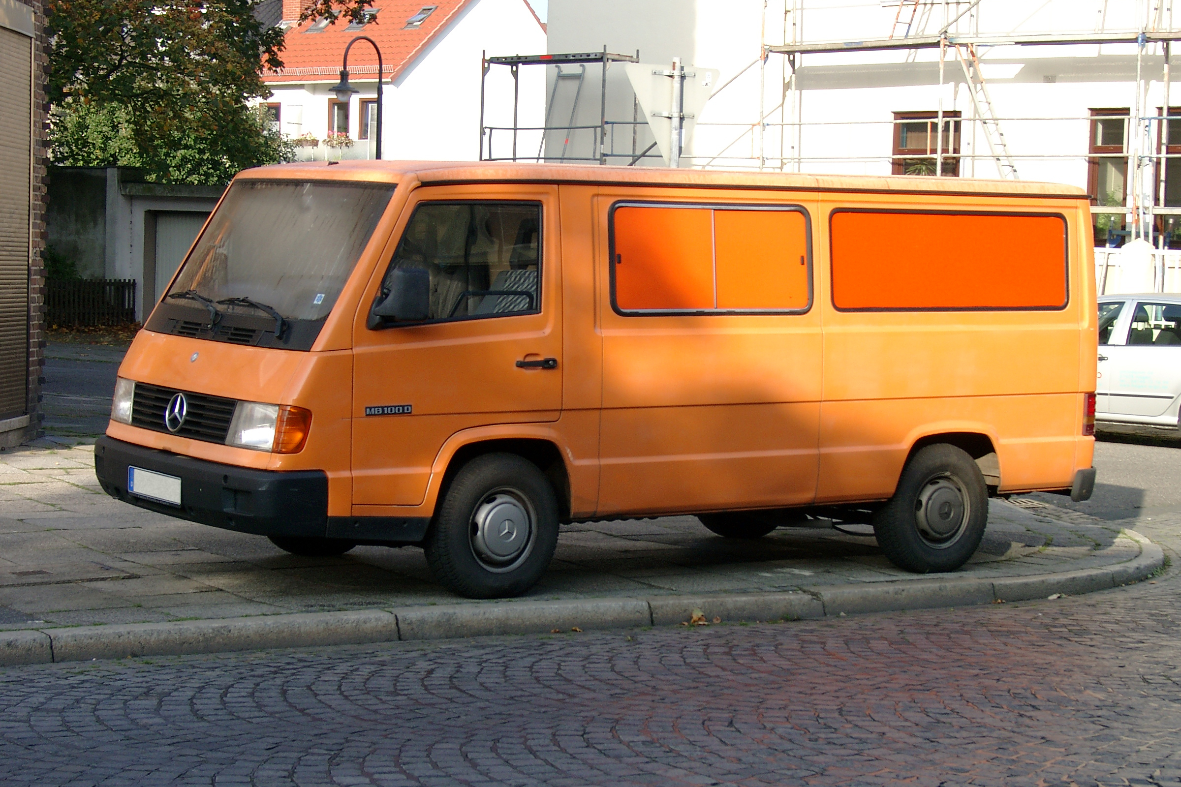 Mercedes-Benz MB 100 D, Vorderseite sichtbar